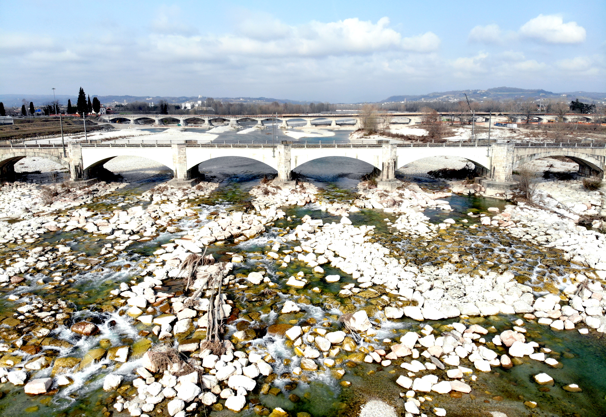 Fiume Piave nei pressi di Ponte della Priula. In primo piano la linea ferroviaria Venezia-Udine